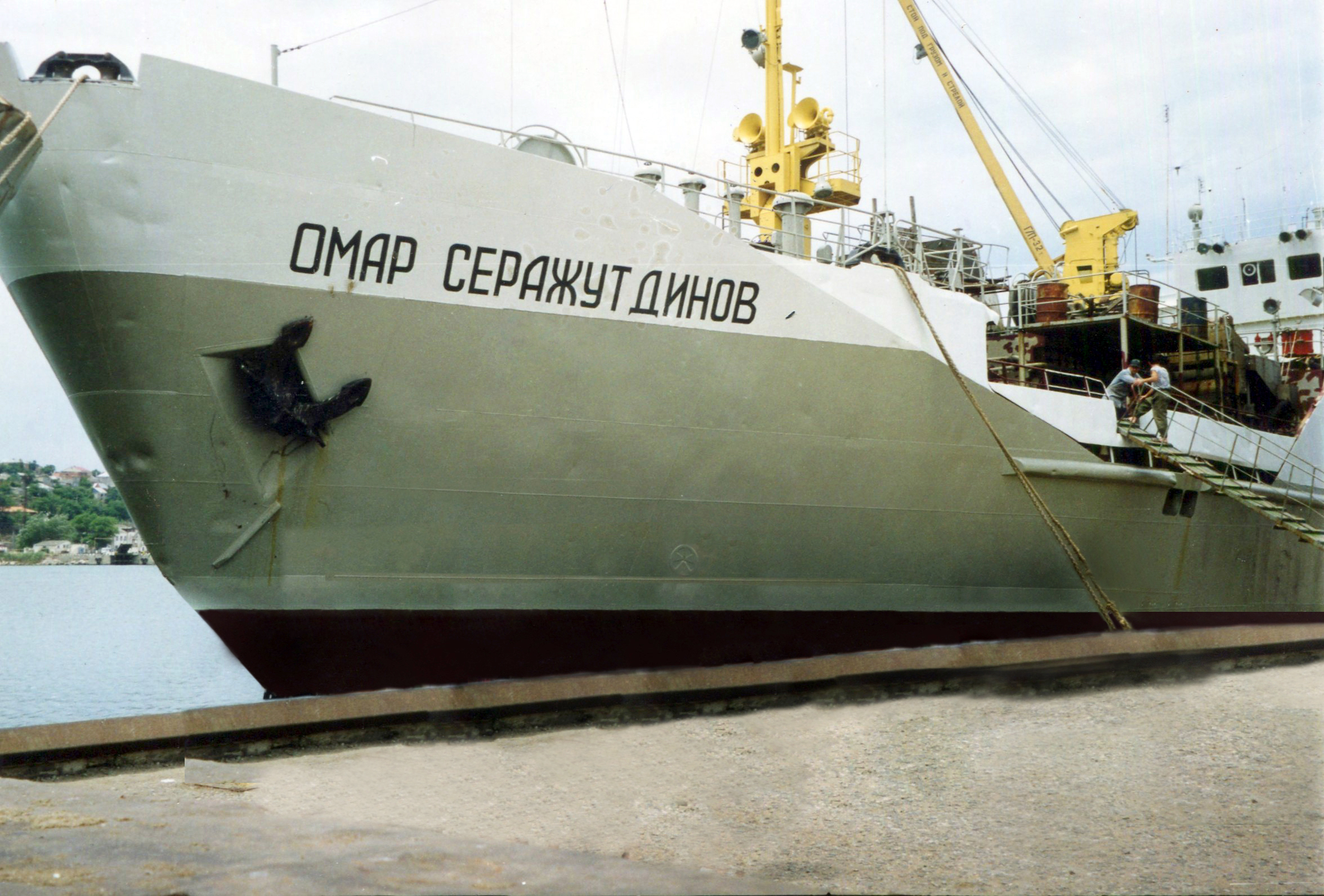 РДОМС Омар Серажутдинов, 1996г.